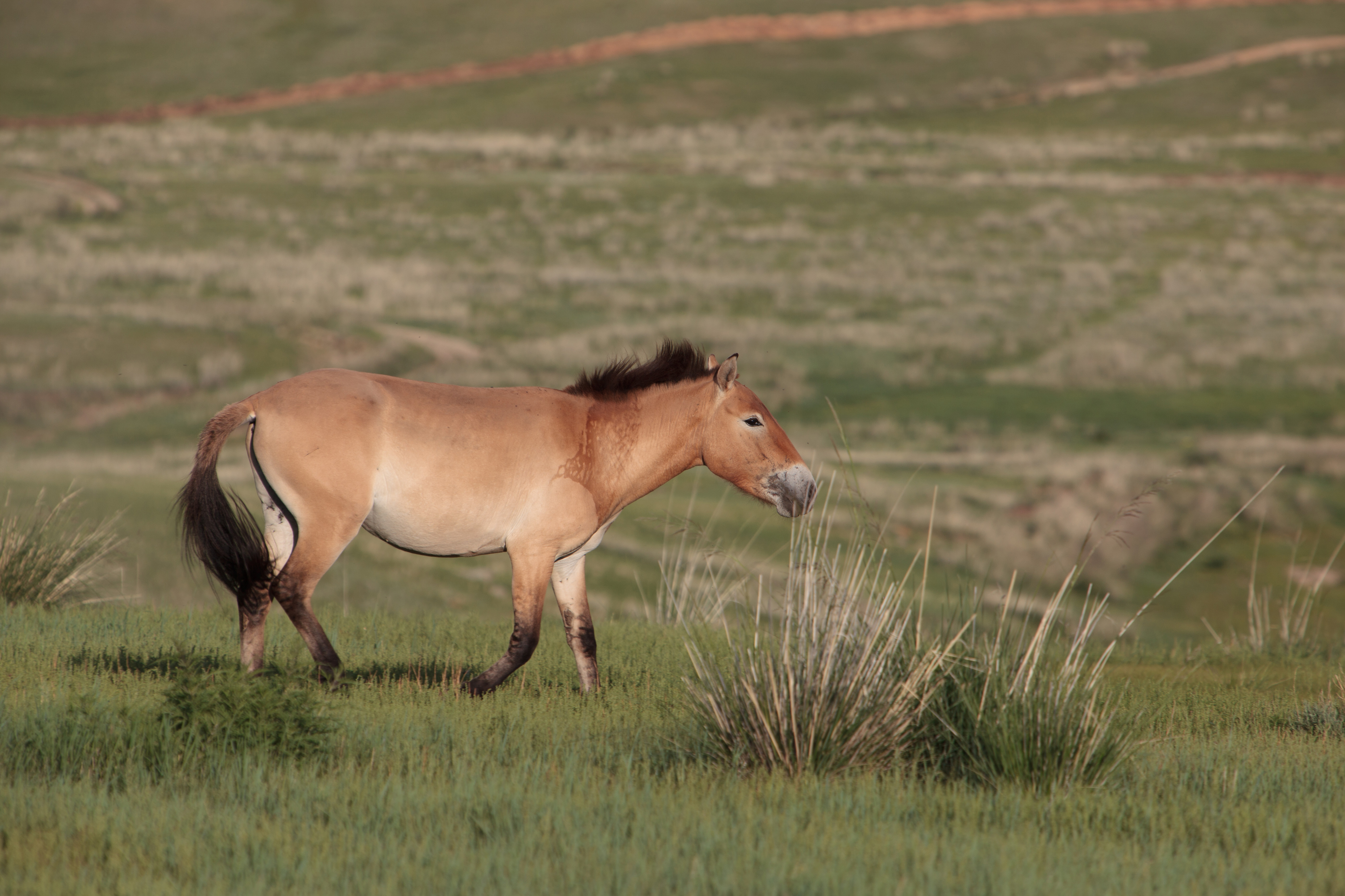 Le cheval de Przewalski Equus przewalskii ou sous-espèce Equus ferus przewalskii ou sous-espèce Equus caballus przewalskii), ou cheval de Prjevalski, encore appelé takh par les Mongols, est une espèce ou sous-espèce très proche du cheval (Equus caballus).